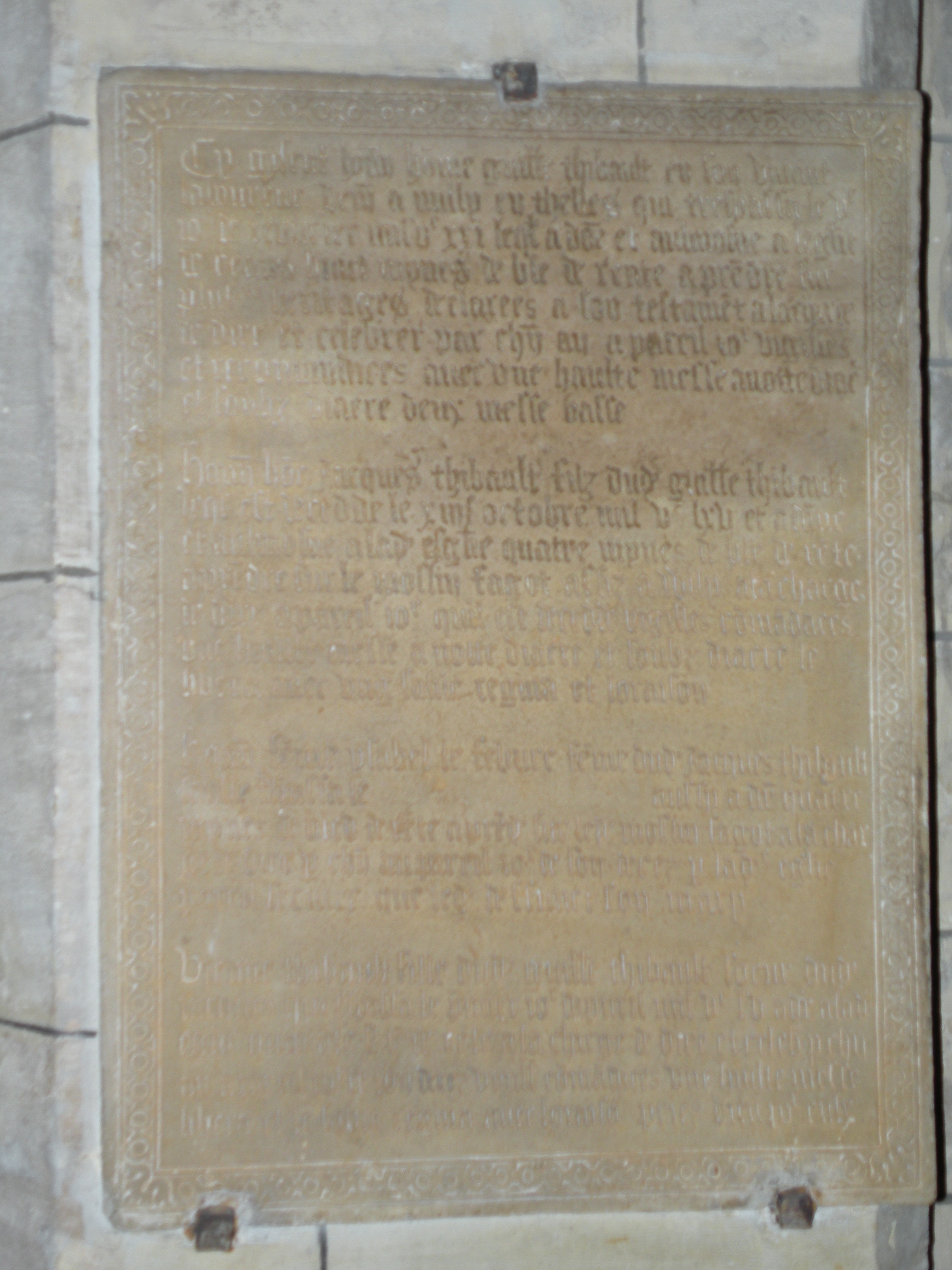 Plaque de fondation de Guillame Thibault et d'Ysabel Lefébure sa femme, 1565 ou postérieur, qualifiée par erreur de dalle funéraire à effigie gravée dans le dossier de classement, qui transcrit pourtant l'épitaphe gravé sur la plaque.